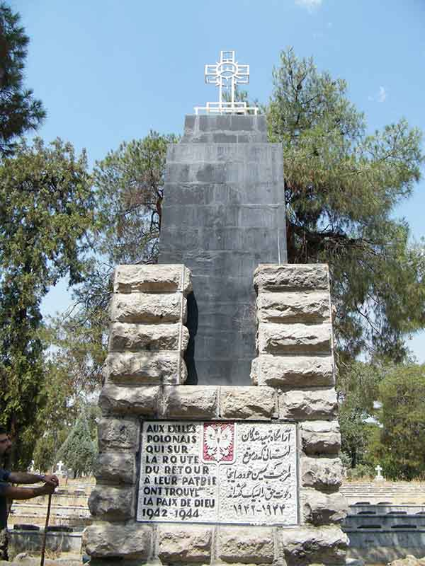 یادمان کشته شدگان و مهاجران لهستانی به ایران و تهران